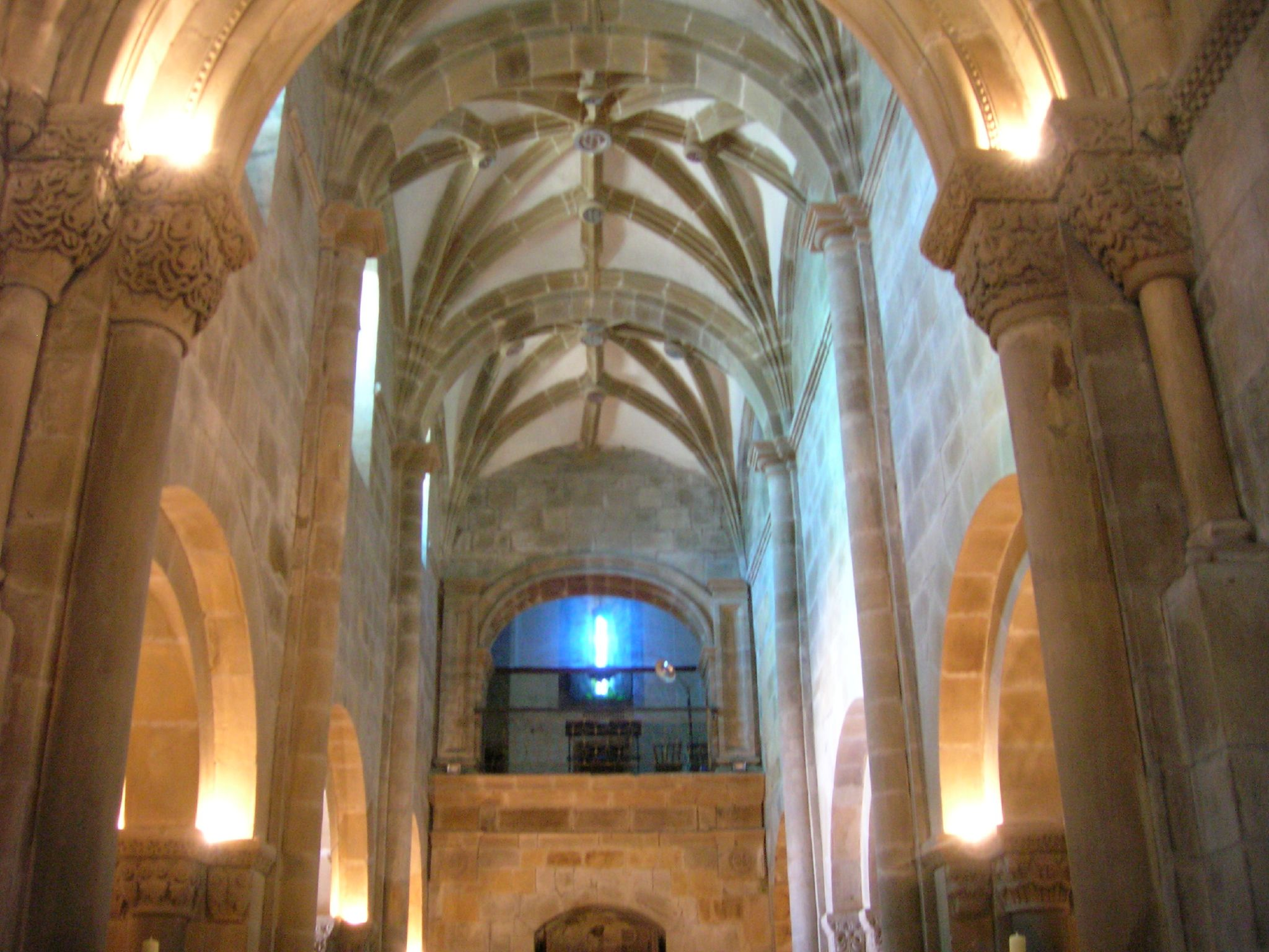 Vista de la nave central desde el altar, con el coro alto al fondo.